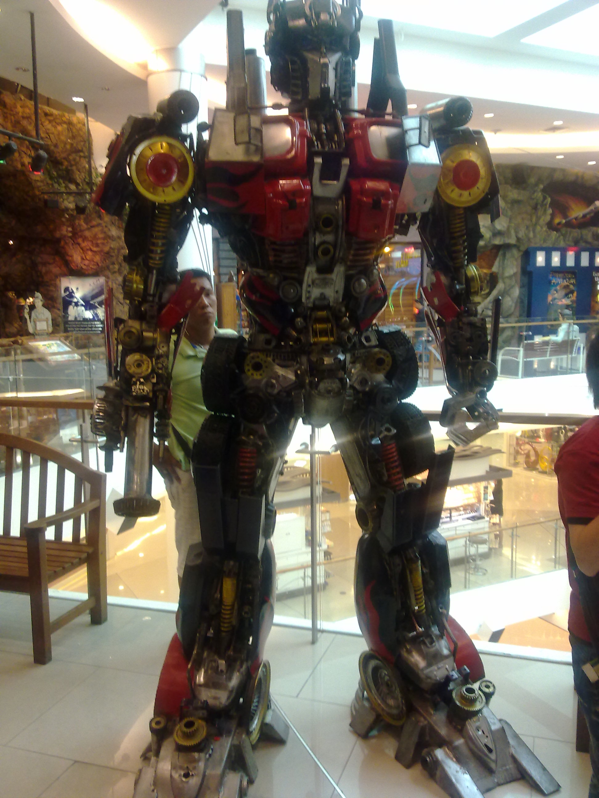 Statue d'Optimus Prime de 2 m de haut dans un centre commercial de Pattaya.